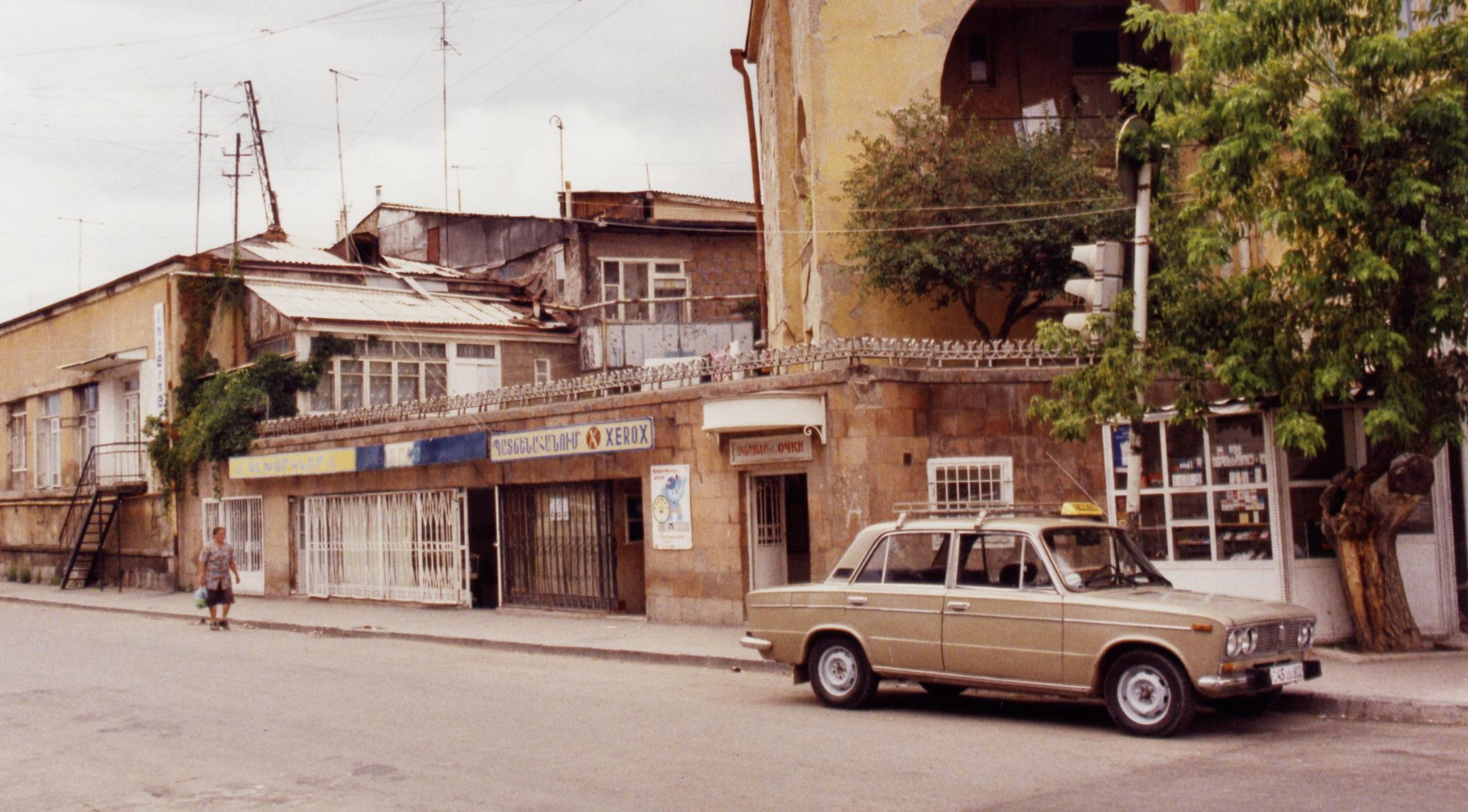 A taxi in Gyumri (Armenia)